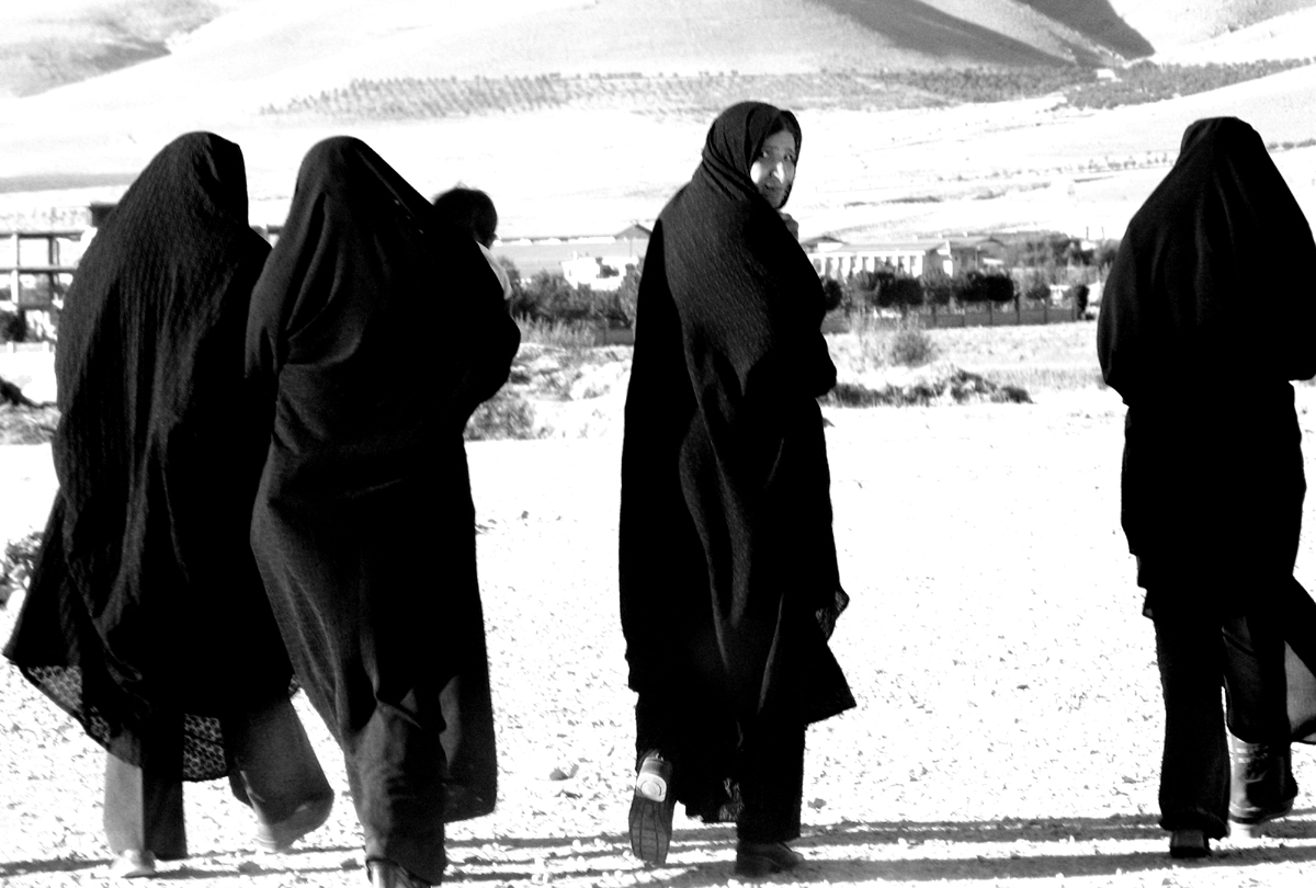 Musulmonės.